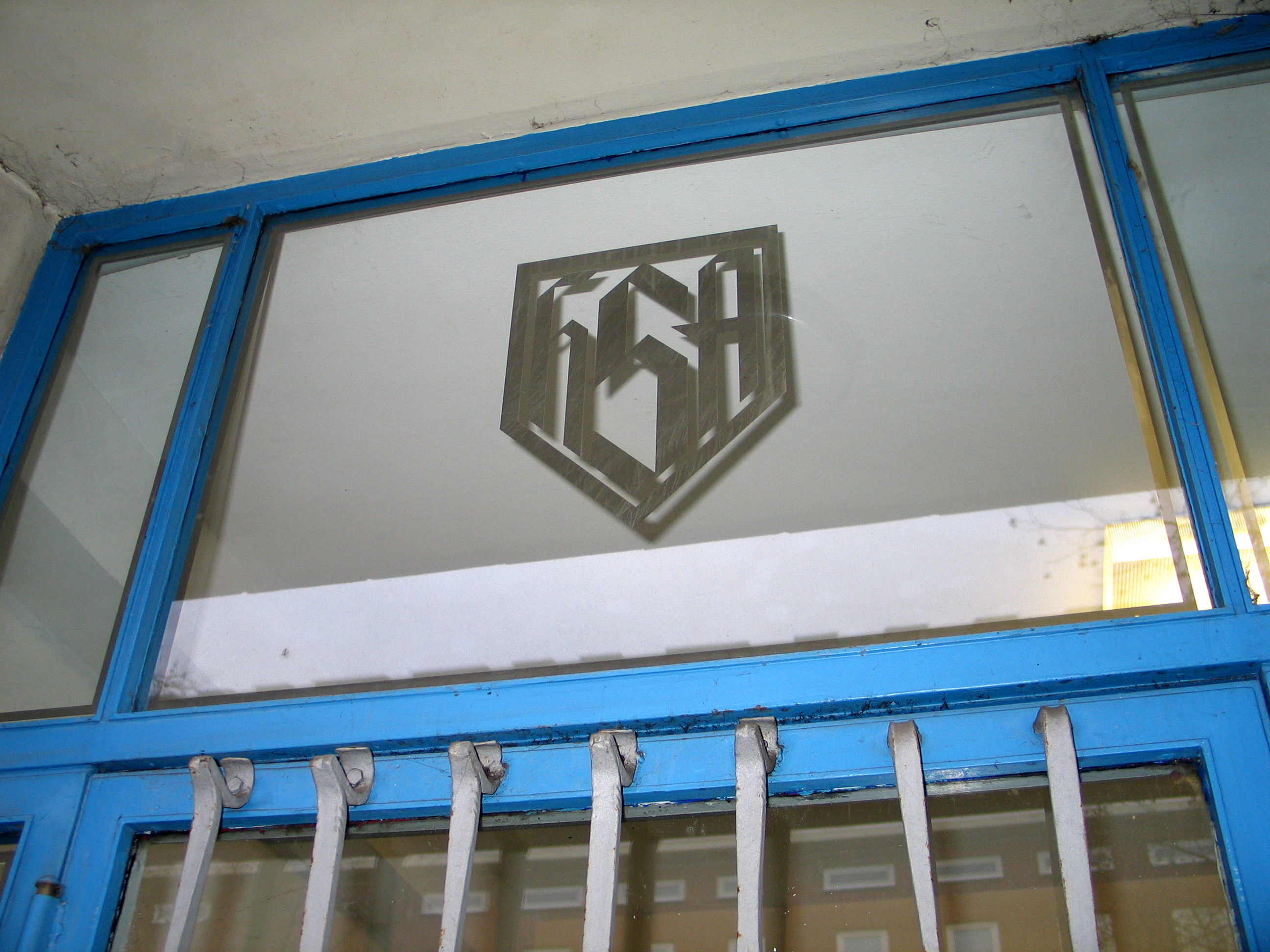 Arndstraße 20 in Hannover-Mitte: Das Logo HAS der Eisen-Aktiengesellschaft Heinrich August Schulte über dem schmiedeisernen Türblatt über dem heutigen Seiten-Eingang zur Bildungsvereinigung Arbeit und Leben Niedersachsen e.V. und zum Berufsfortbildungswerk (BfW) ...